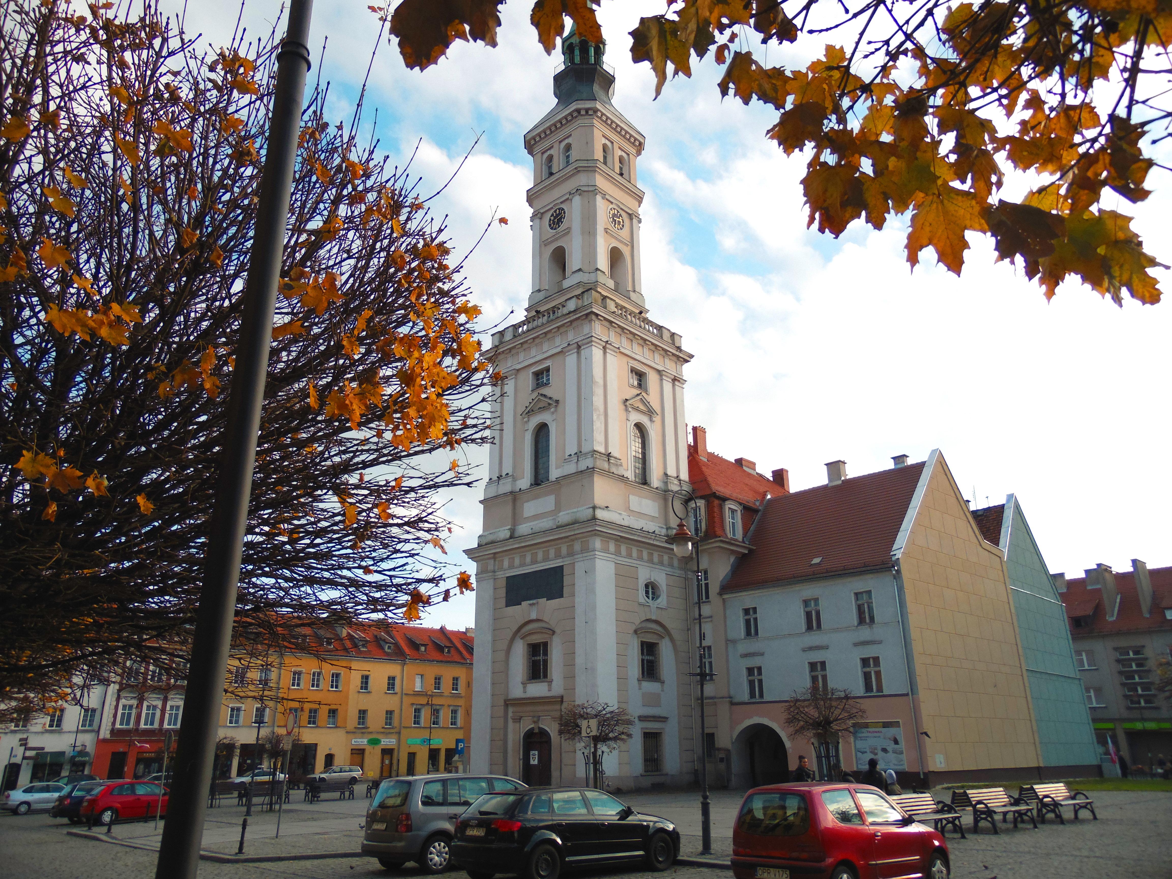 Prudnik, ratusz (XVIII w., 1840) 10.1958. Pierwotnie miała polski napis, został zlikwidowany za Fryderyka II na jego koszt